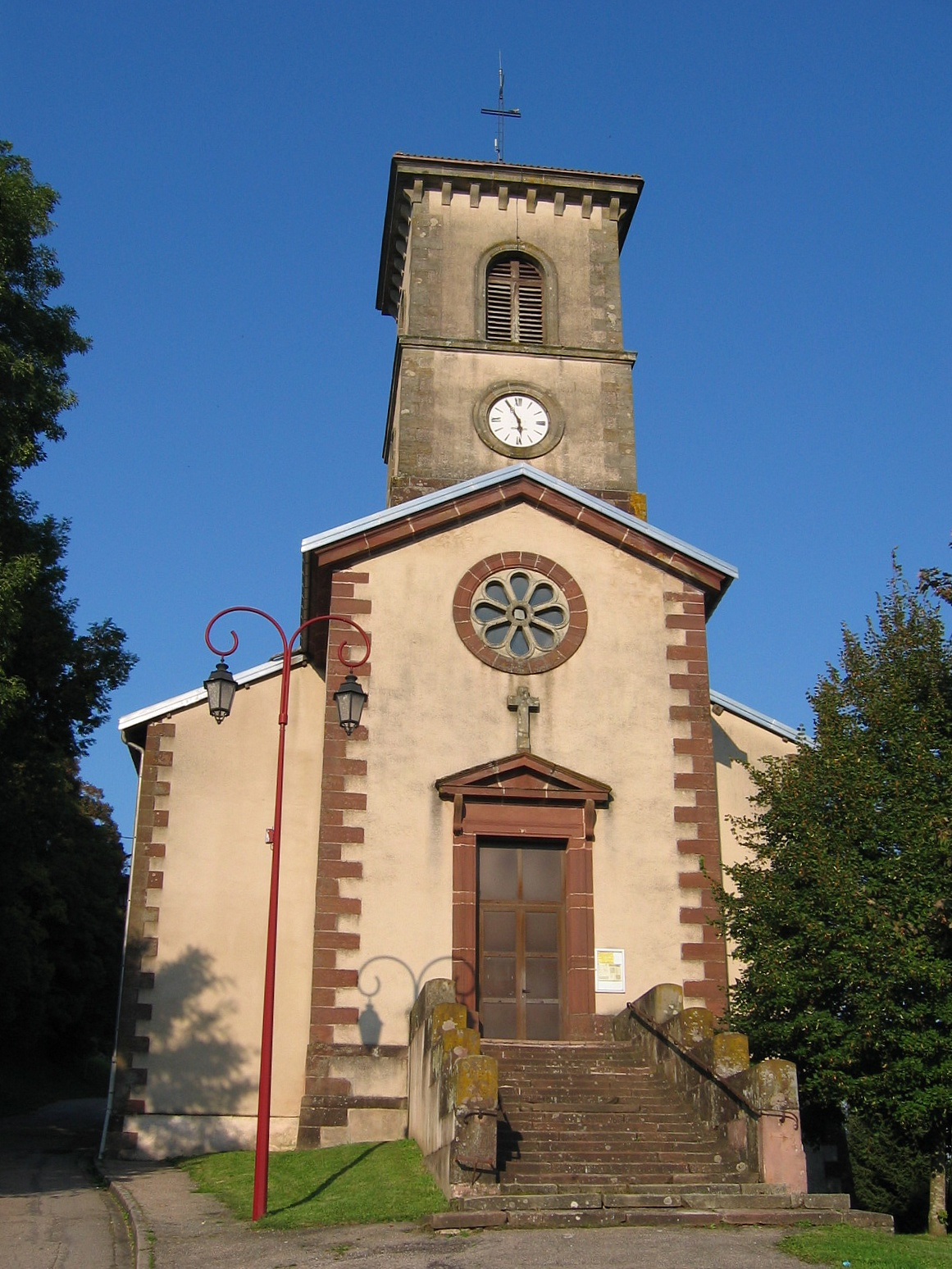 Eglise Saint-Pierre